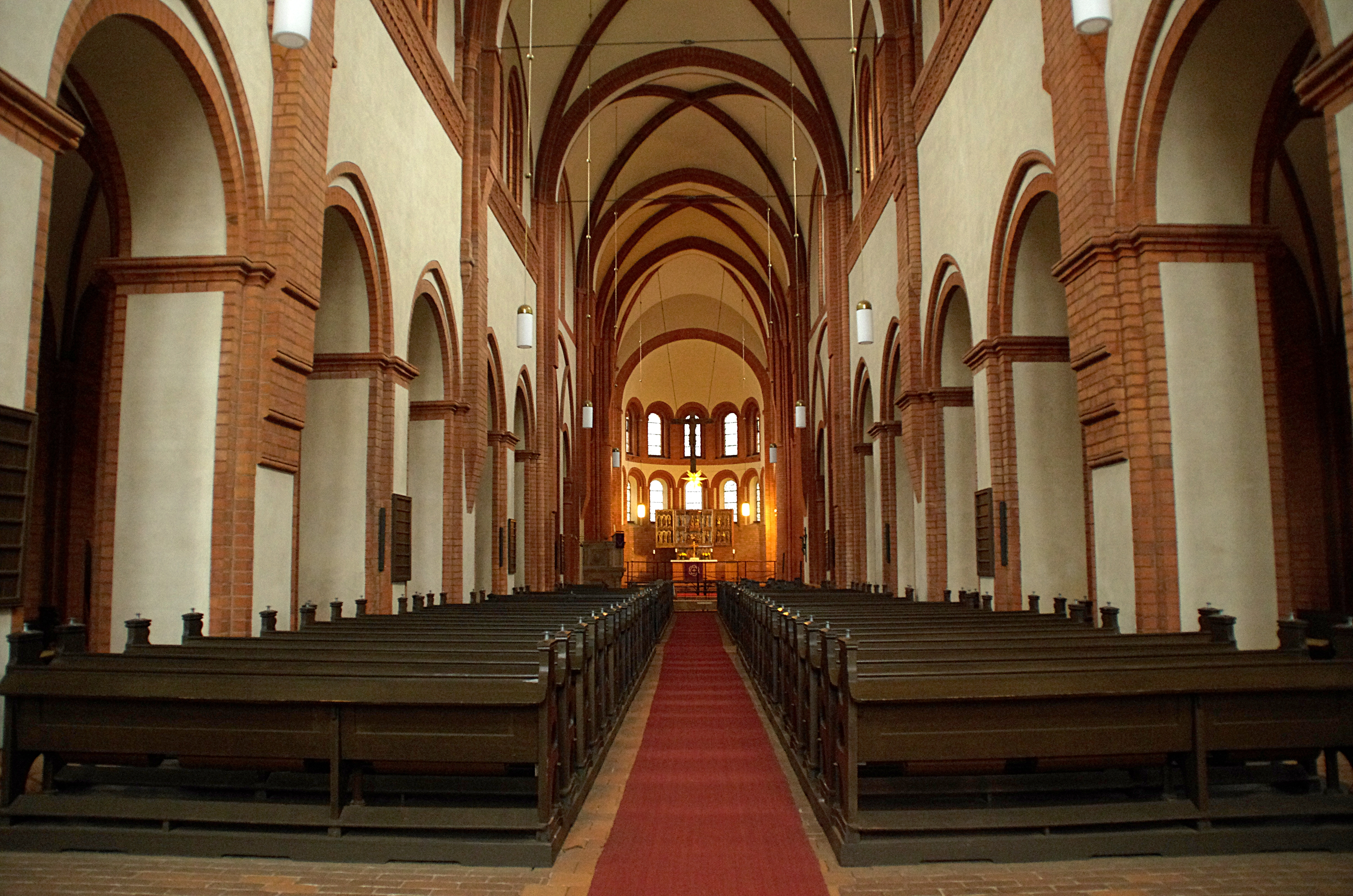 Kloste rLenin in Brandenburg. Das Langhaus der Kirche des Klsoters. Es steht unter Denkmalschutz.